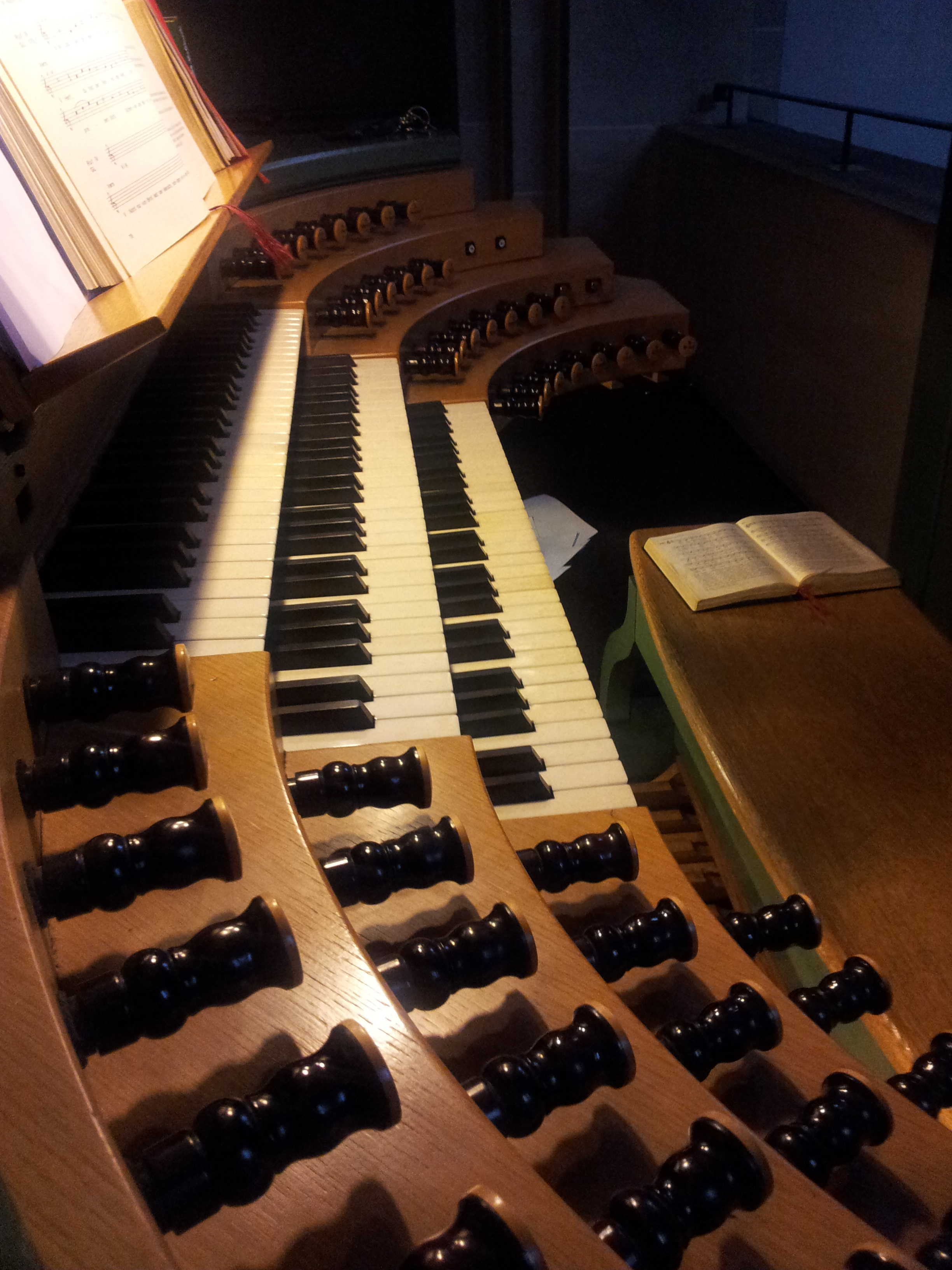 Spieltisch Orgel